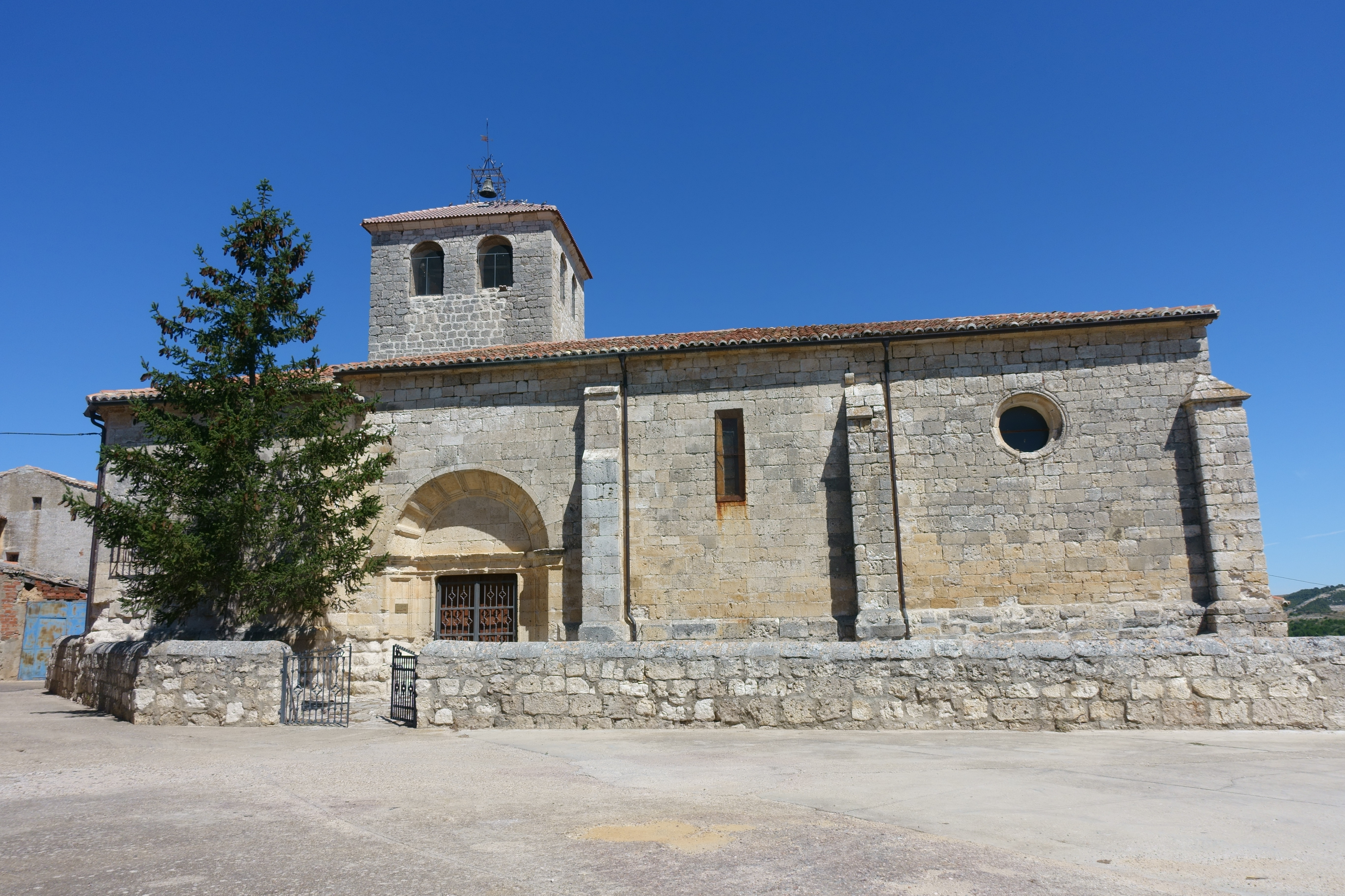 Iglesia de San Esteban, Tabanera de Cerrato (Palencia, España).